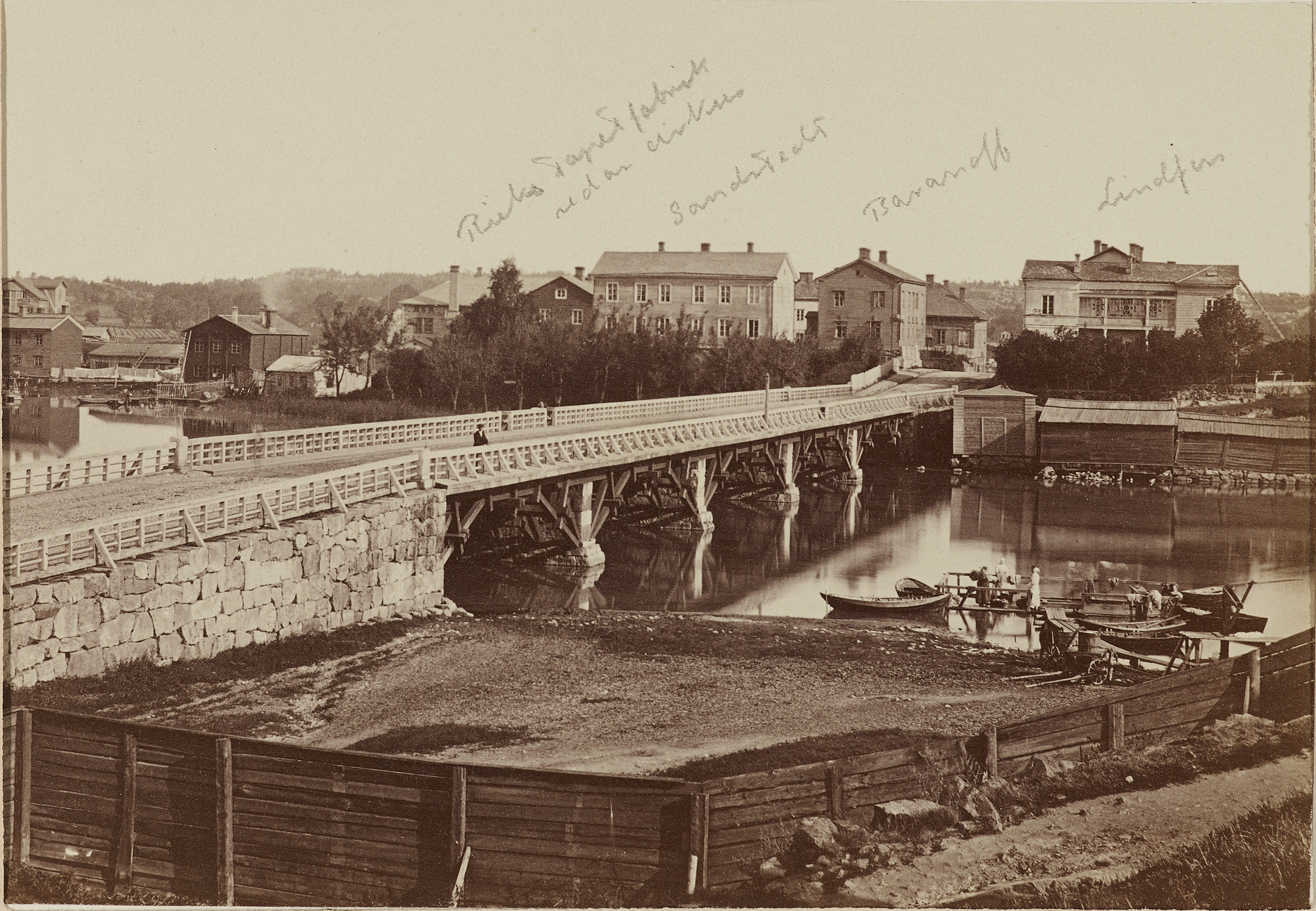 Pitkäsilta, taustalla Rieksin tapettitehdas ja huviloita, etualalla naisia matonpesussa. Kuvattu Kruununhaasta kohti luodetta. Kuvaaja Eugen Hoffers.